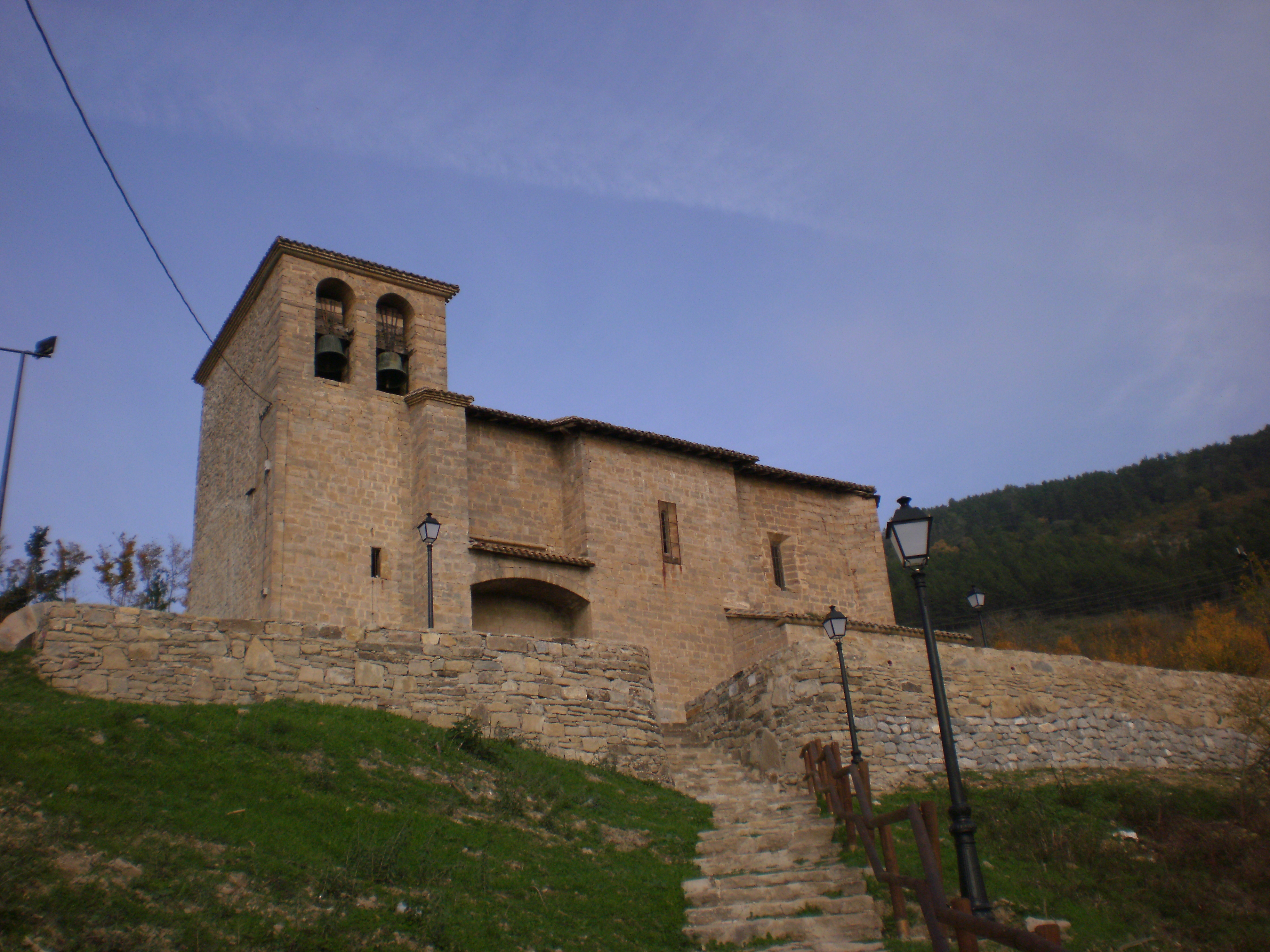 Iglesia de San Cosme y San Damian del Casco Viejo de Ansoáin (Navarra-España)